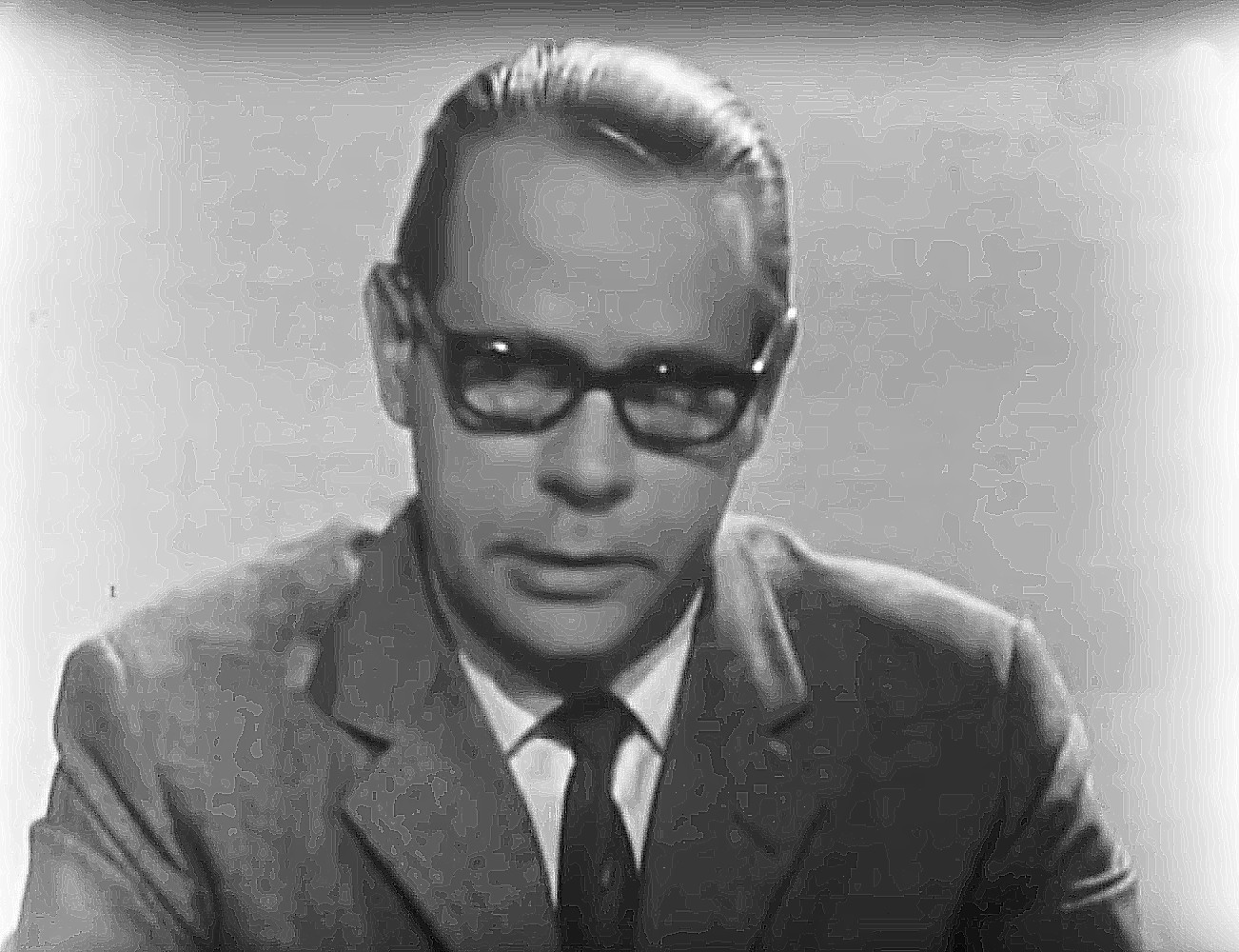 Lars Orup intervjuar Tage Erlander inför valet 1966.